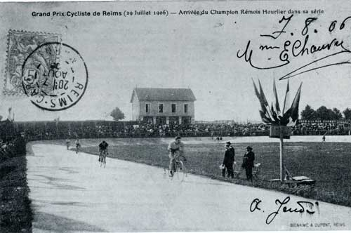 Grand Prix de Reims 10 juillet 1906 Léon Hourlier